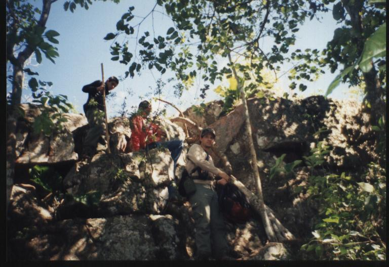 parque Cerro cora